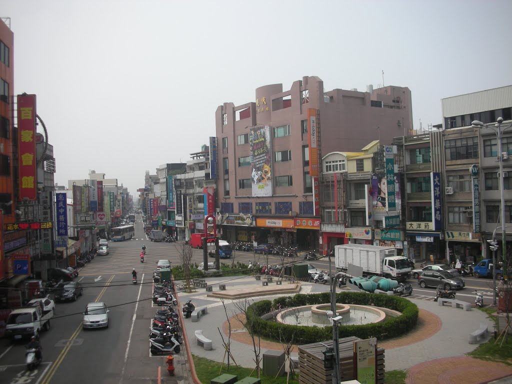 苗栗縣頭份鎮中心街景